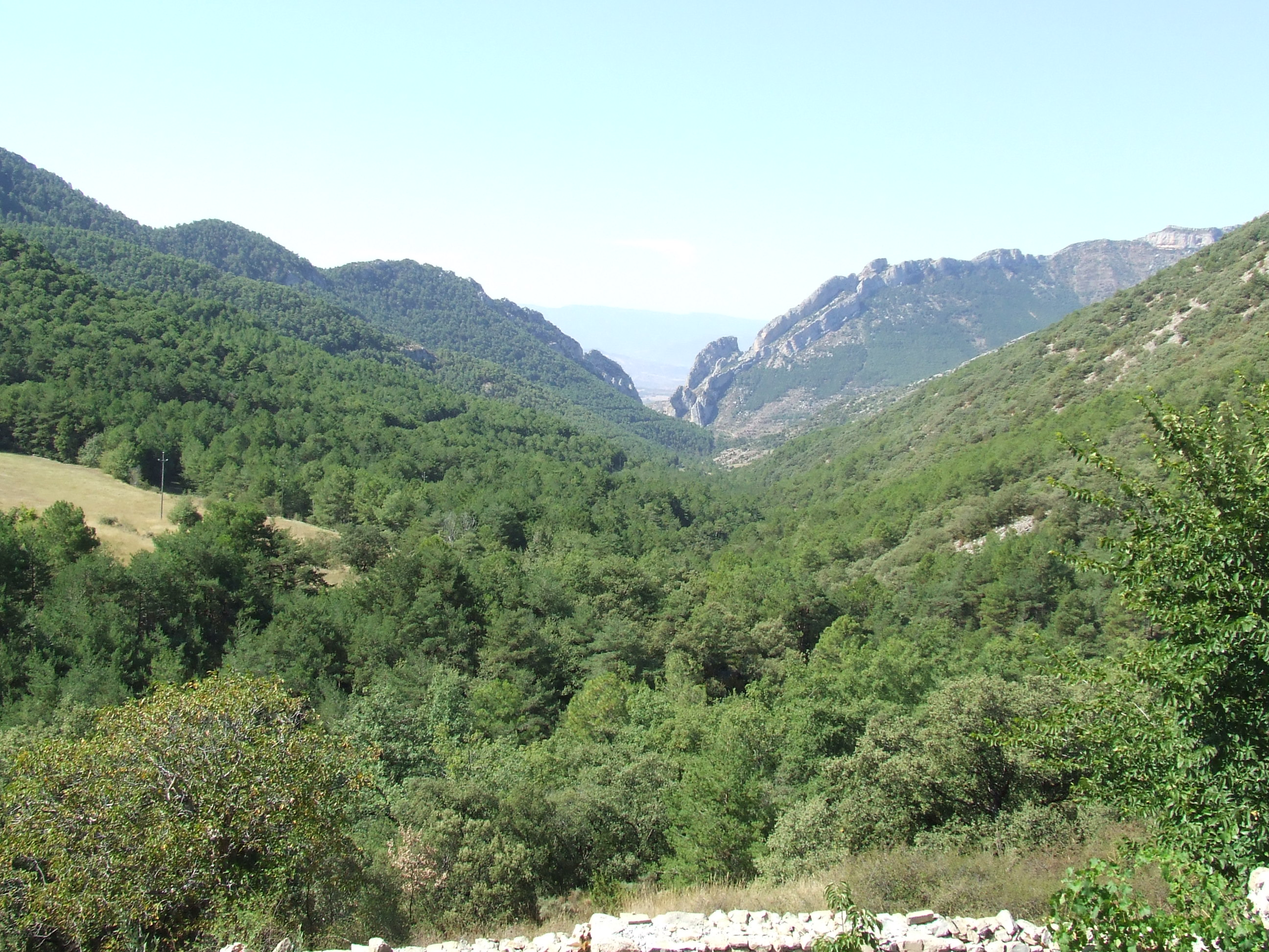 La vall del riu d'Abella (Abella de la Conca, Pallars Jussà)